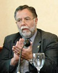 Jose Bayardi